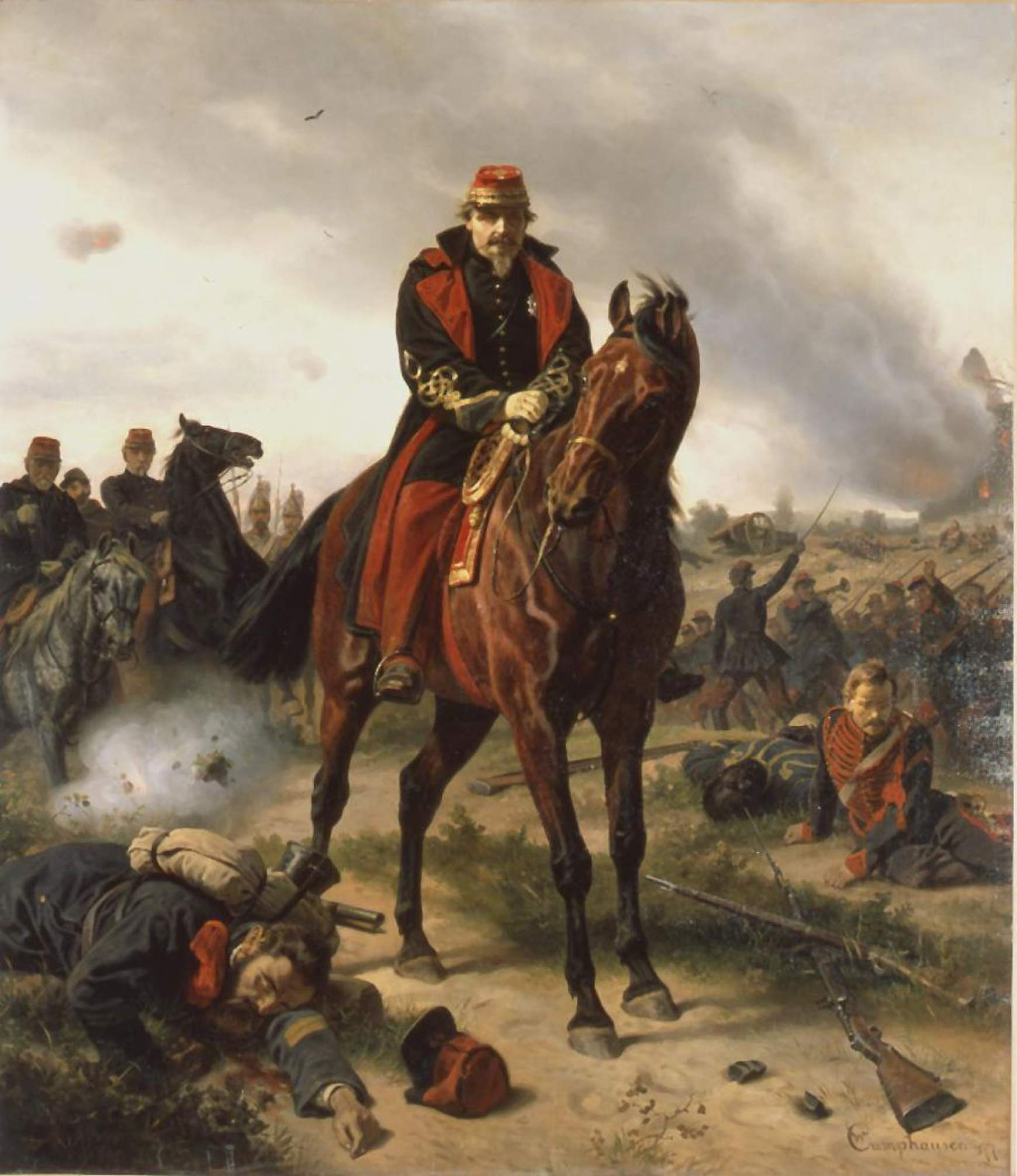 Napoléon III. bei Sedan von Wilhelm Camphausen (1885 gestorben)